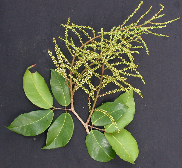 Feuilles et inflorescences en boutons de Prioria copaifera (Fabaceae), photographie prise à San Lorenzo (Colon, Panama).